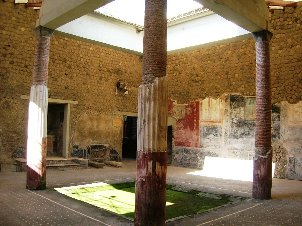 Atrio di Villa San Marco